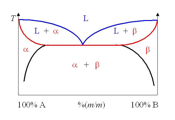 Eutektikus fázisdiagram, a szolidusz és a likvidusz szemléltetésére